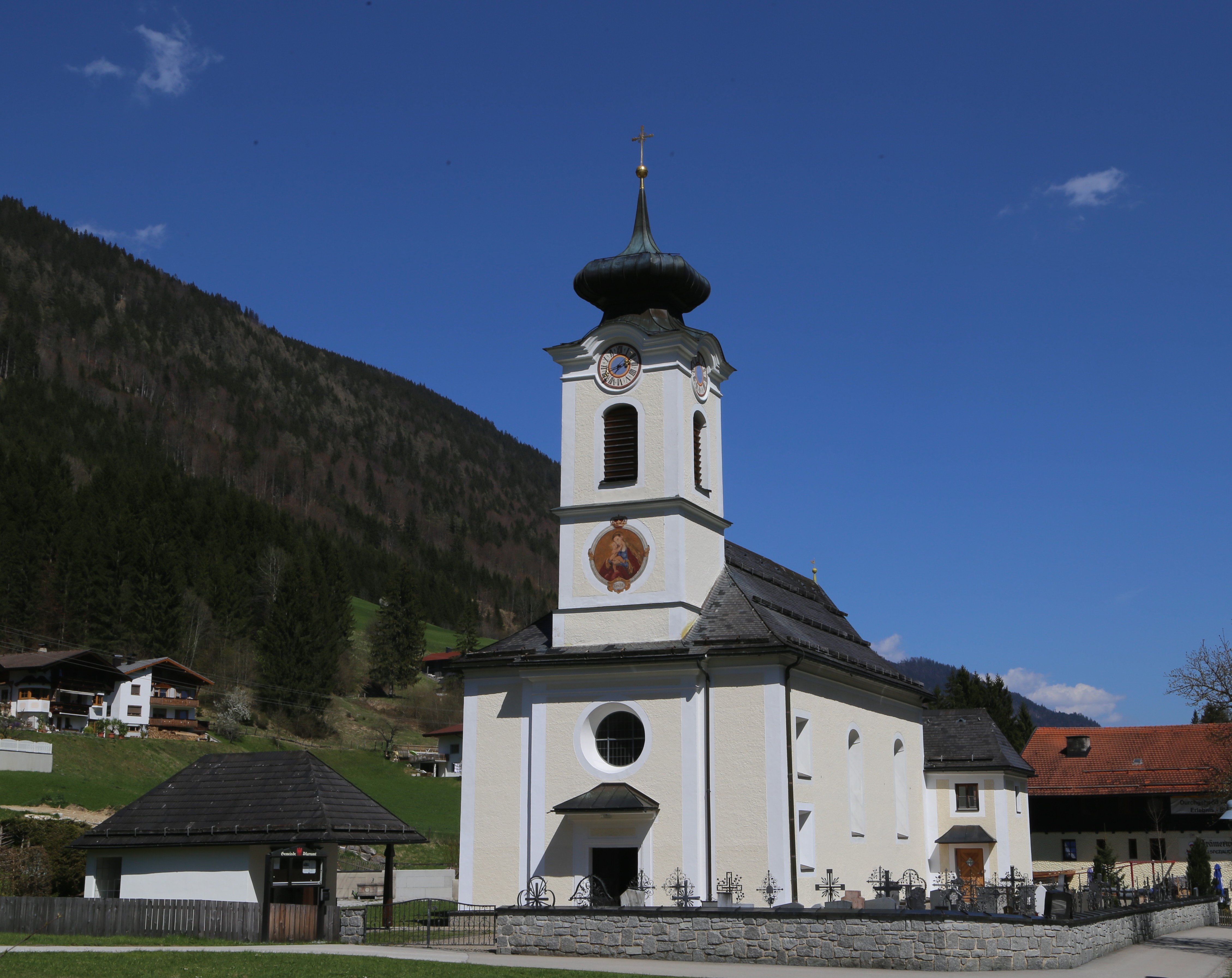 Kath. Pfarrkirche Mariahilf und Friedhof, Landl, Thiersee